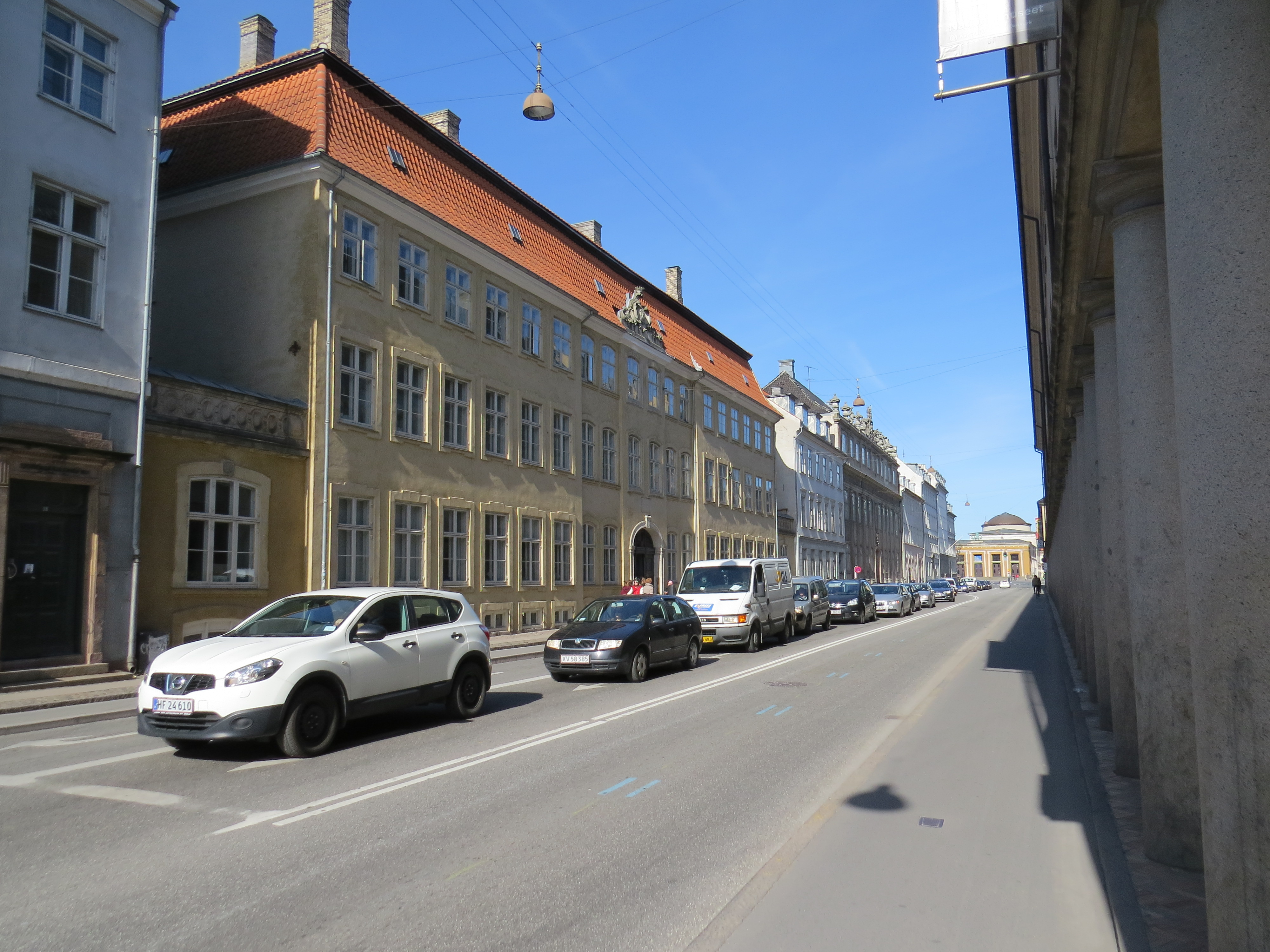 Stormgade, København